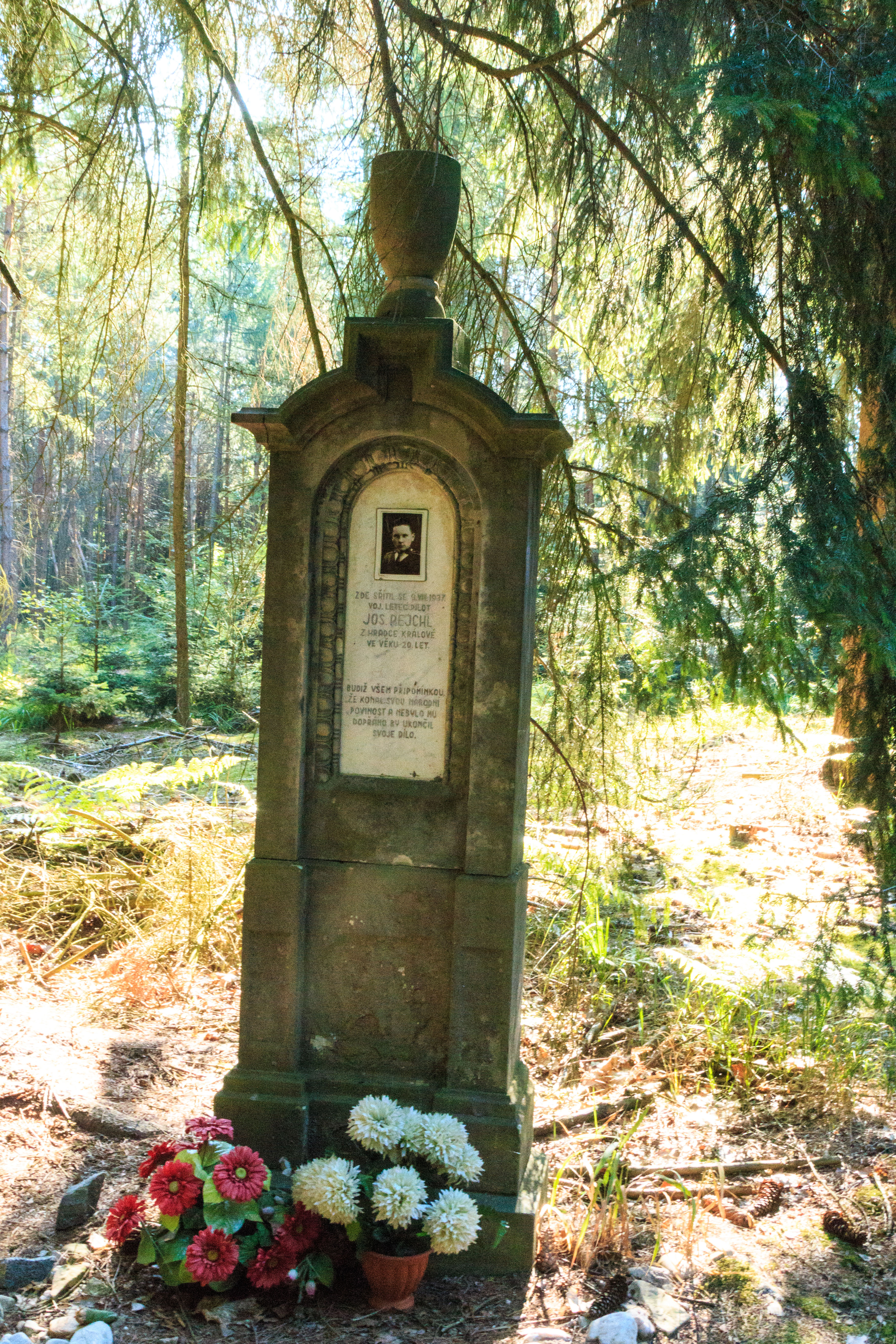 Pomník u Oboreckého rybníka Project: Vodstvo